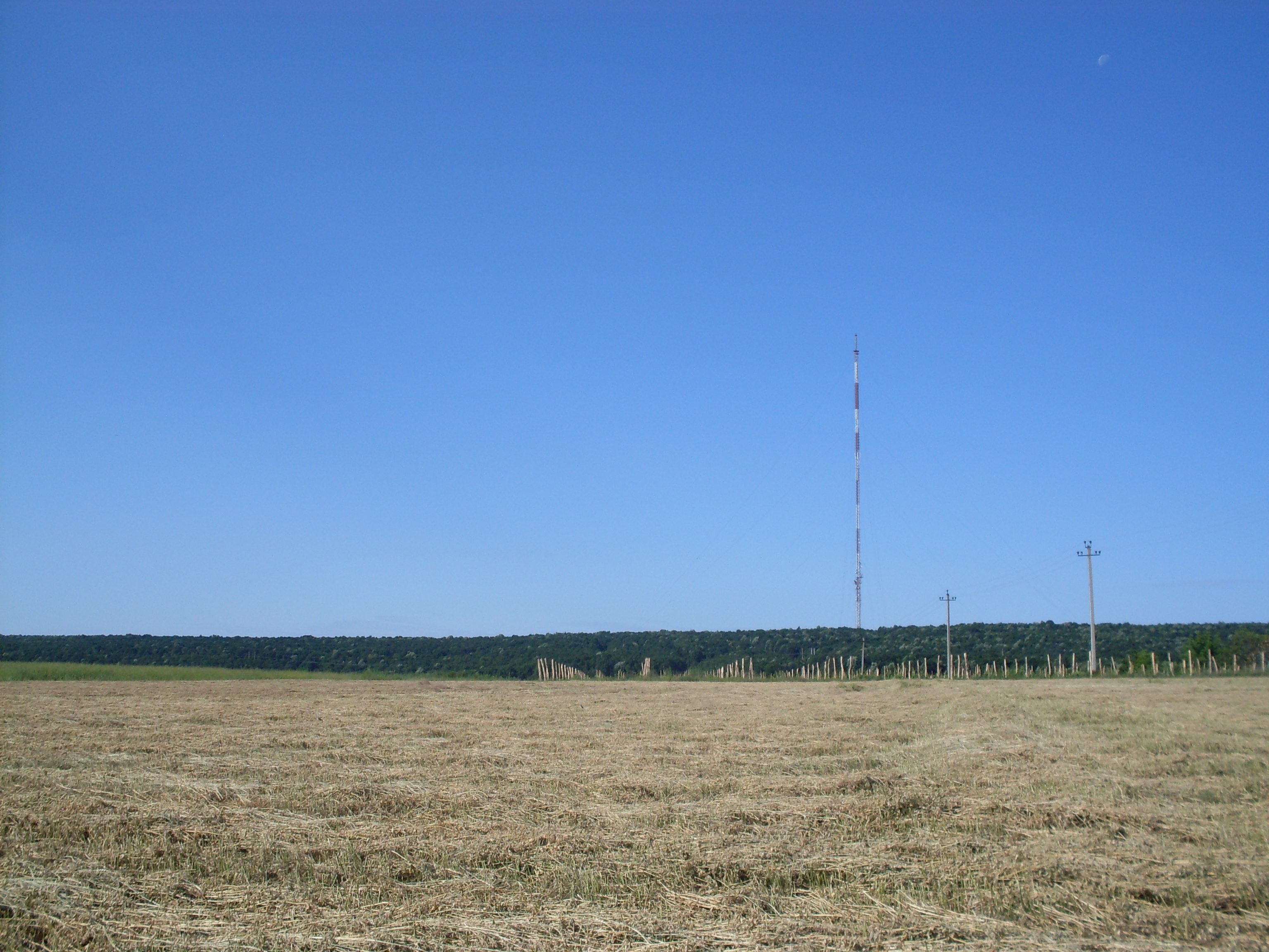 Pășuni și vii în împrejurimile orașului Strășeni. Pe planul Scoreni și antena TV din Strășeni